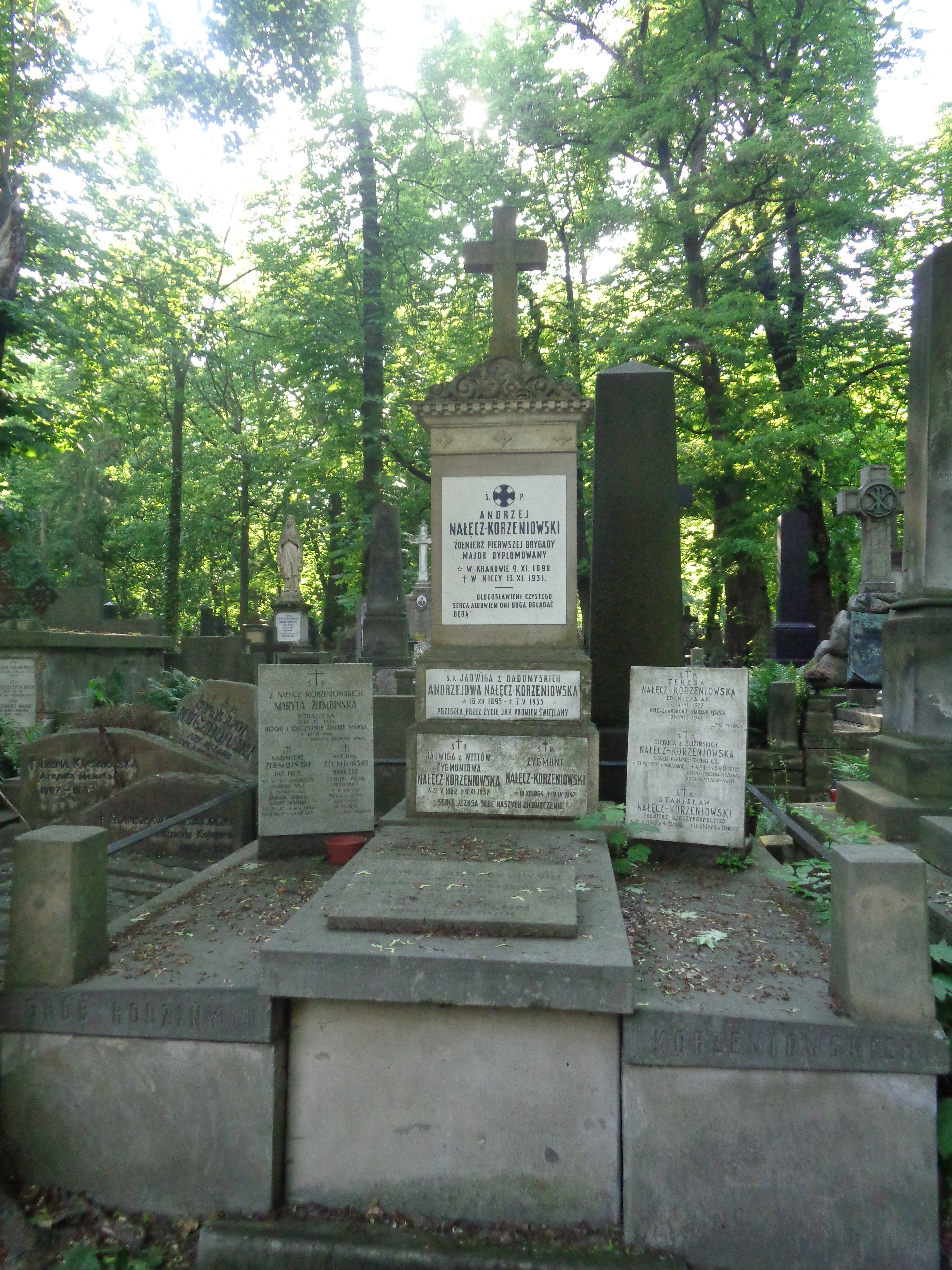 Grób Andrzeja Nałęcz-Korzeniowskiego na Cmentarzu Powązkowskim